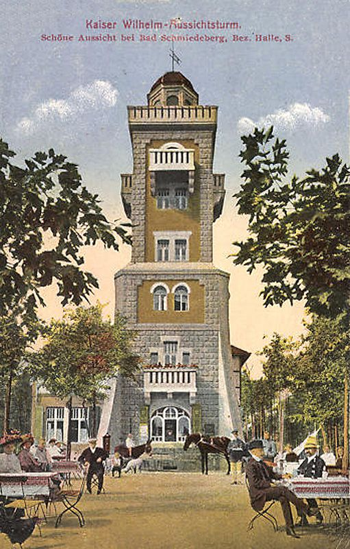 Ansichtskarte des Kaiser-Wilhelm-Turms bei Bad Schmiedeberg von 1920